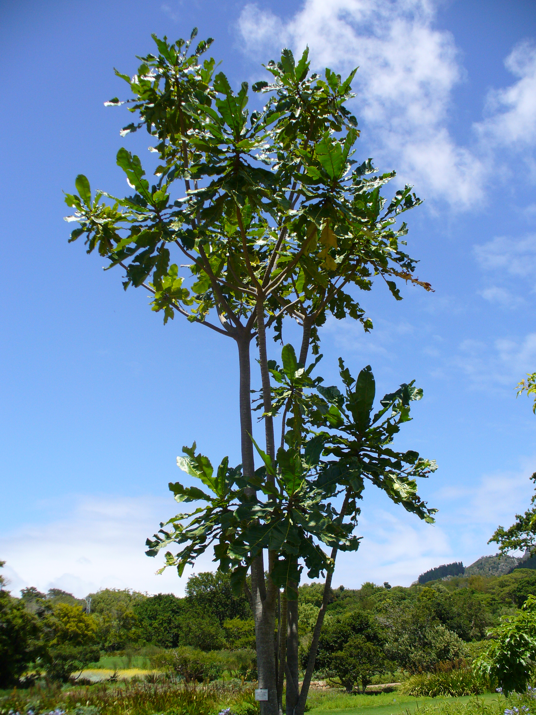 Forest Fever Tree